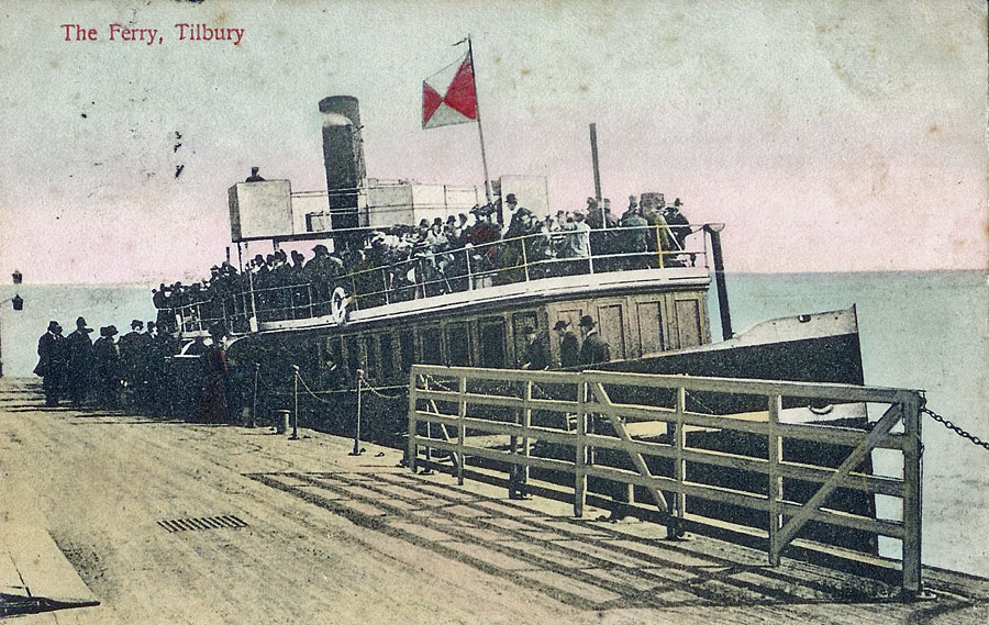 Паром «Carlotta», работавший в конце XIX-начале XX века на переправе Грэйвсенд-Тильбюри, причал Тилбури, открытка 1905 года